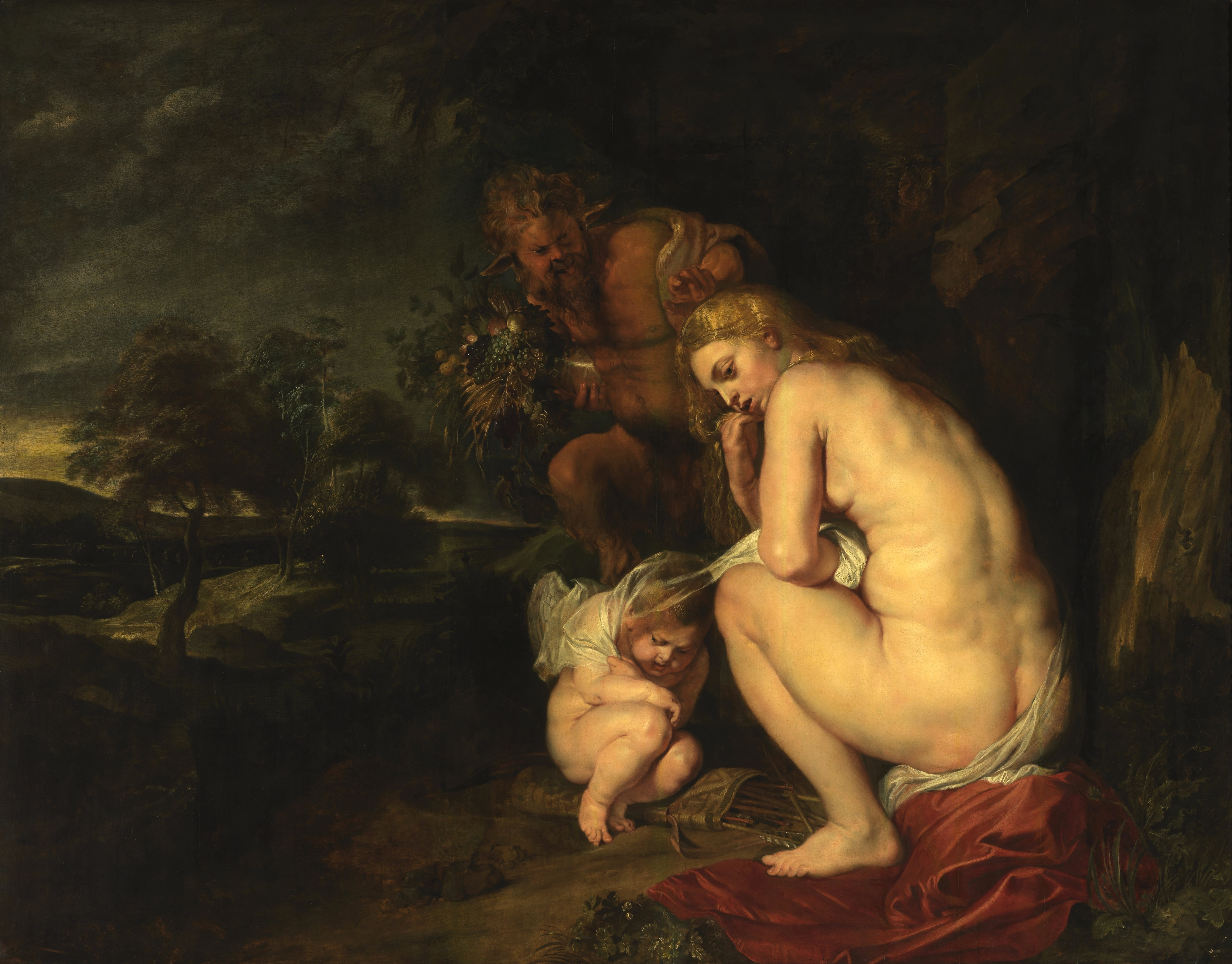 Zonder Ceres en Bacchus bevriest Venus, zonder brood en wijn is er geen liefde.